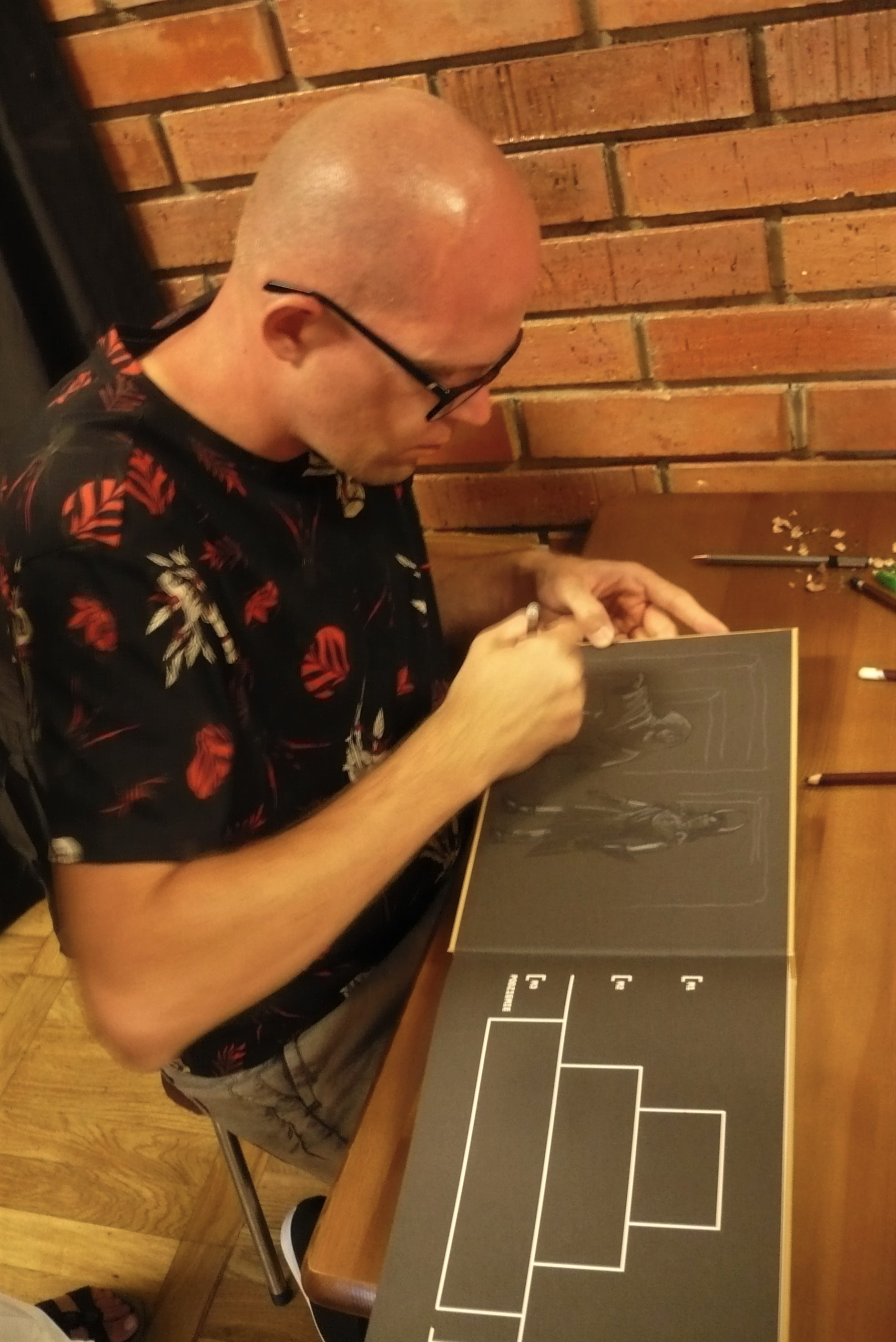 Daniel Chmielewski podczas Festiwalu Góry Literatury, 15.07.2018